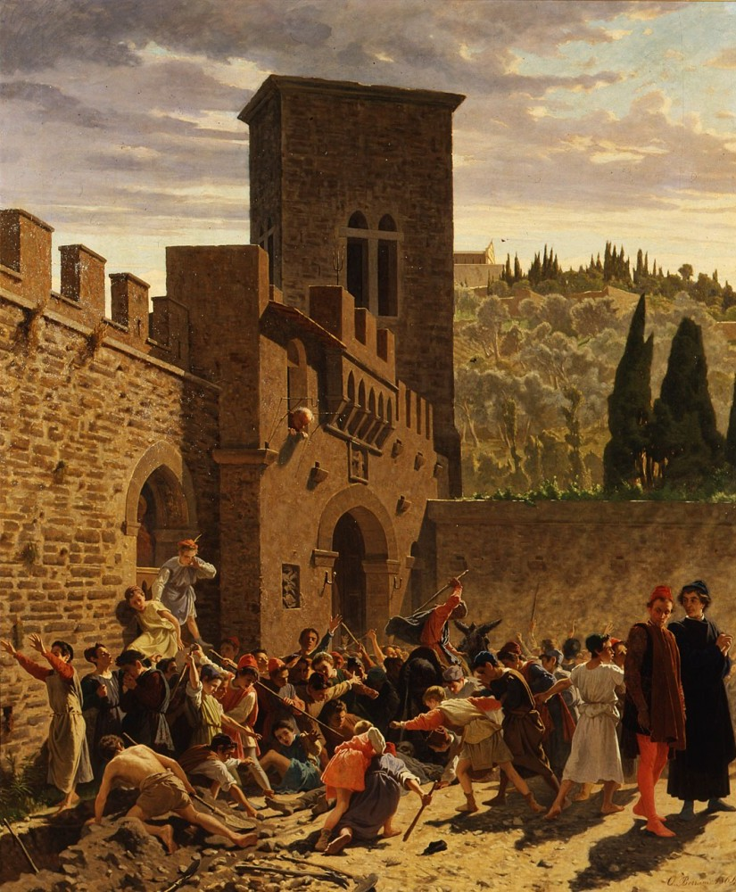 Olio su tela di Odoardo Borrani, 1864